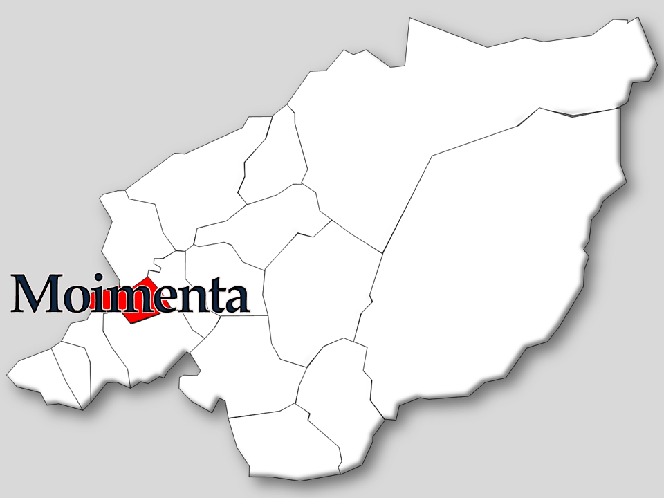 Censos 1864/2011